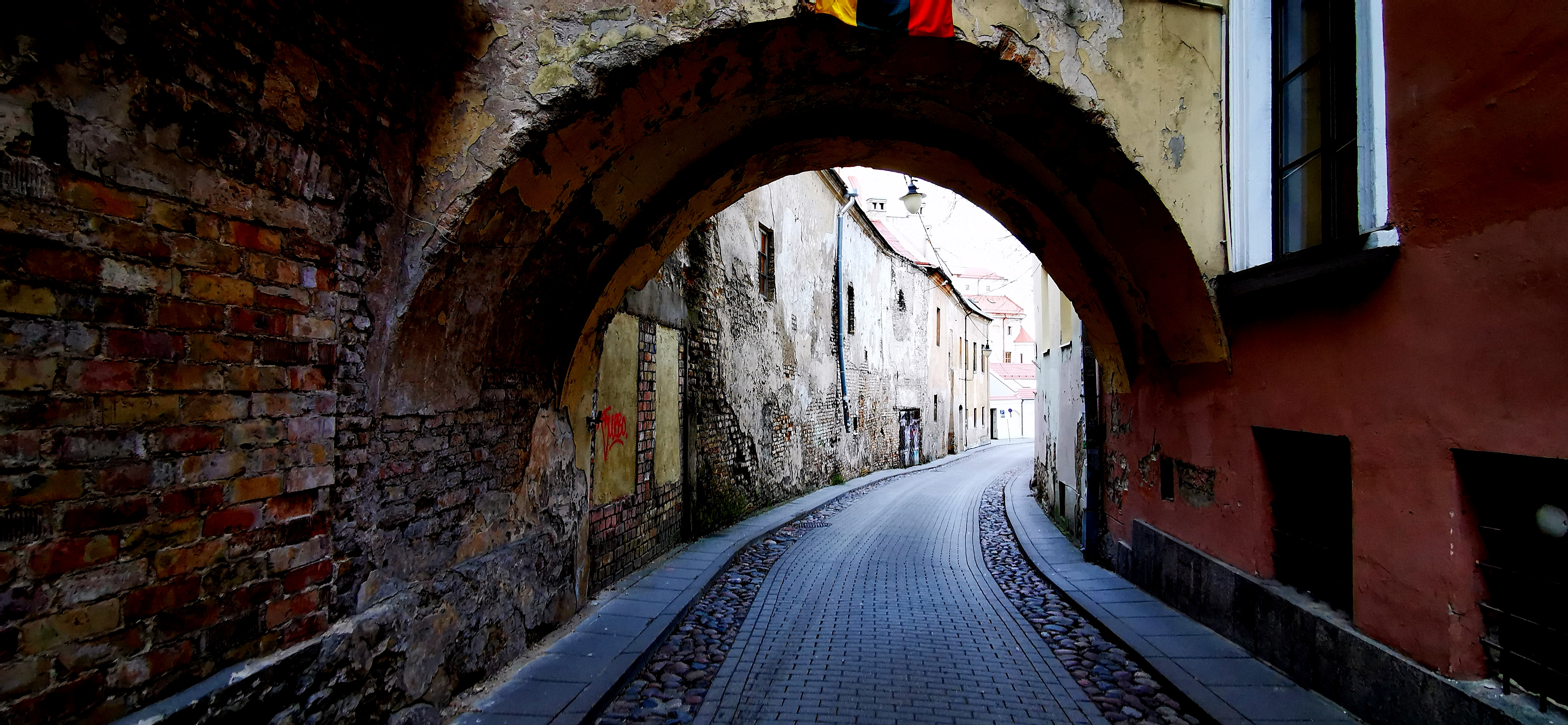 Šv. Kazimiero gatvė